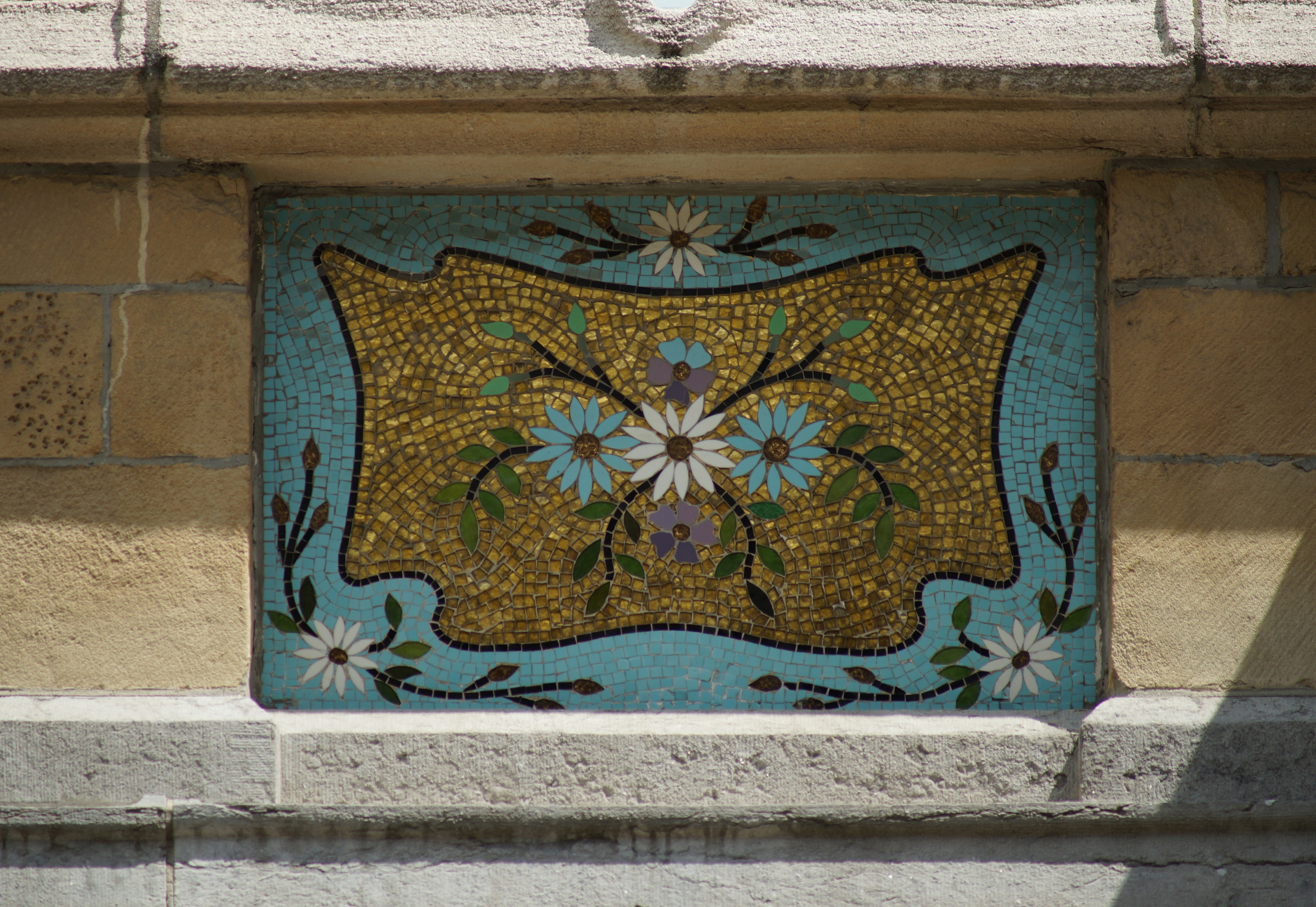 Oeuvre van architect Jozef Baeckelmans